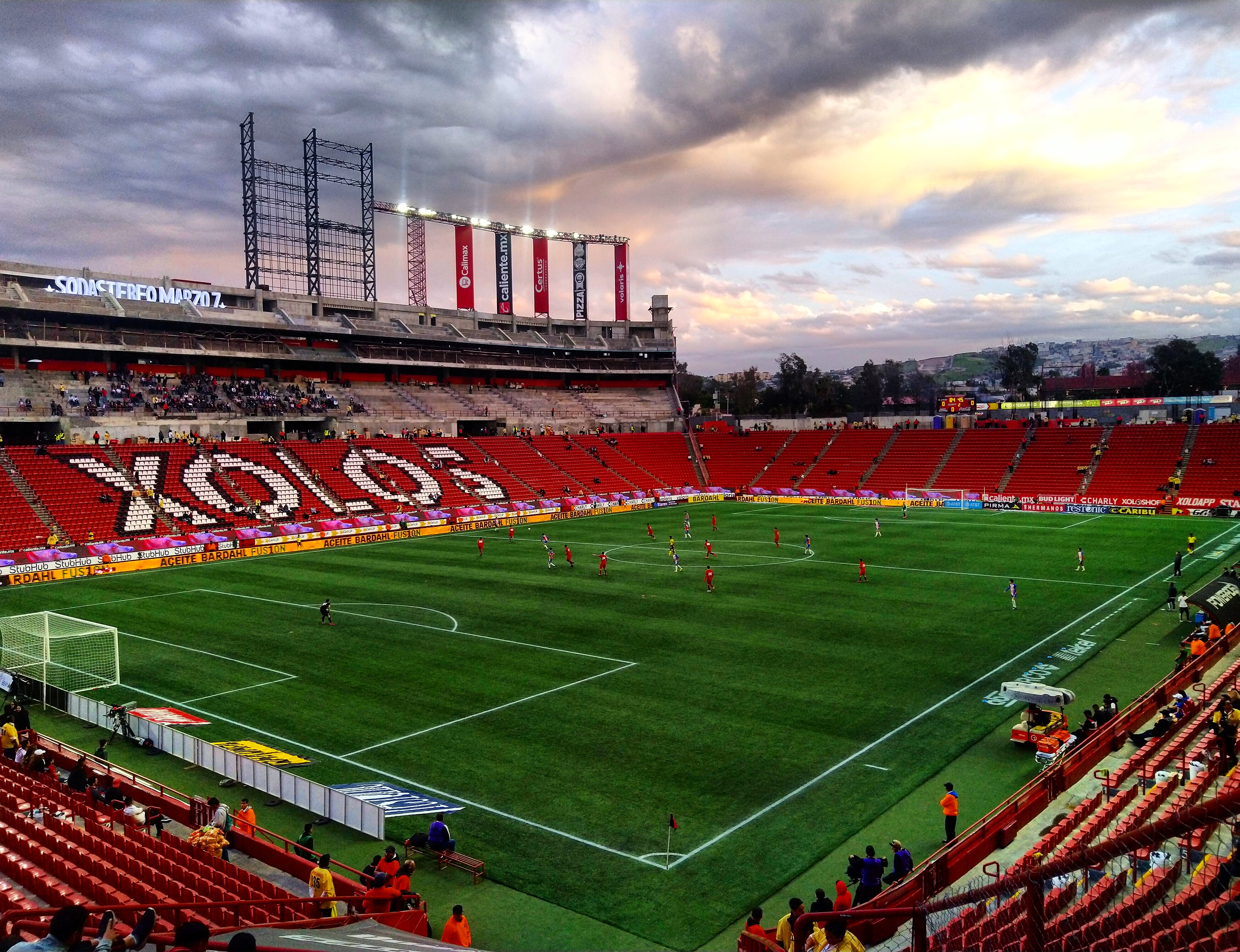 Vista del Estadio Caliente, en la jornada 7 del Clausura 2020